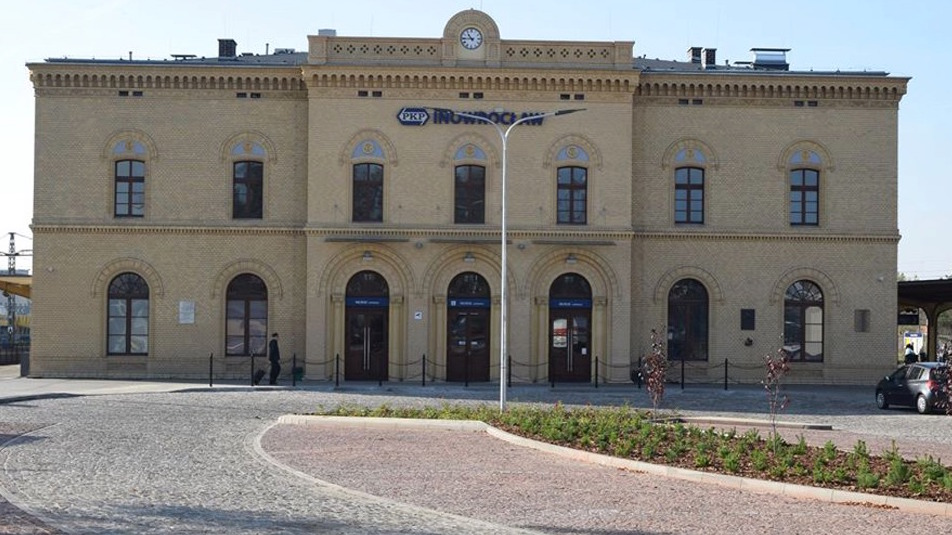 Budynek dworca kolejowego